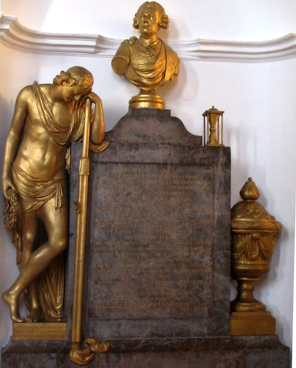 Pfarrkirche Offenstetten, Landkreis Kelheim, Niederbayern: Das vom Münchner Hofbildhauer Anton Boos 1794 geschaffene Grabmal des Aloysius Wigulaeus von Kreitmayr.